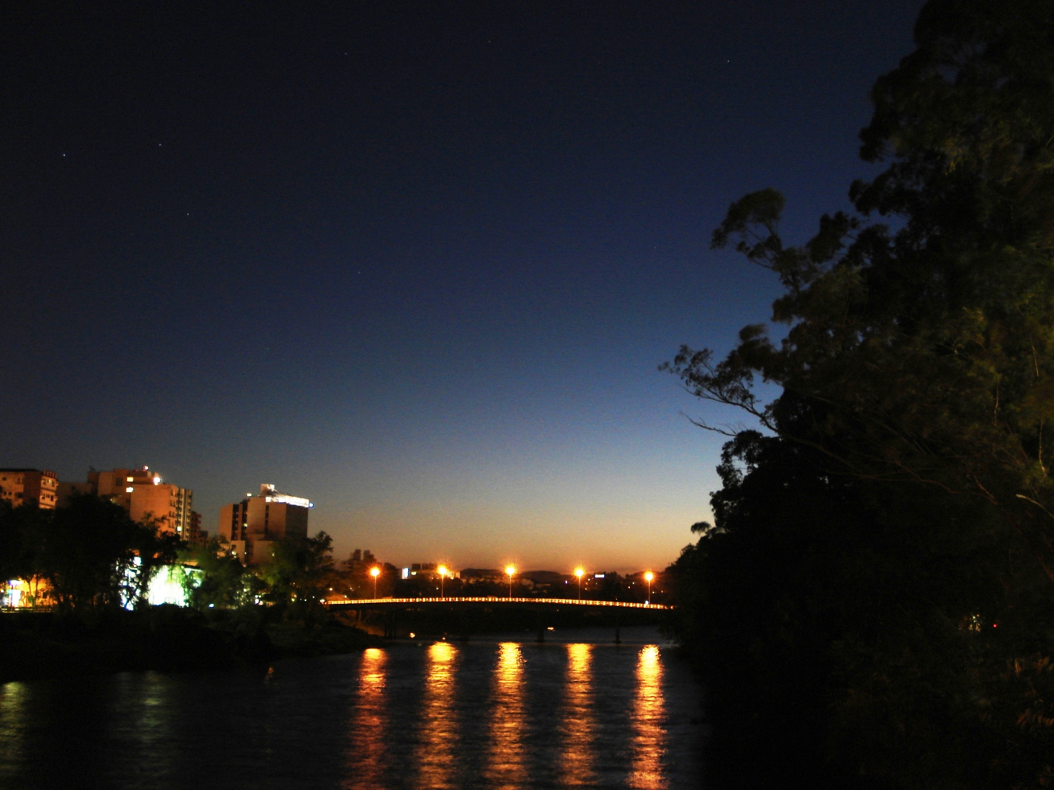 Pôr do sol no centro de Tubarão/SC